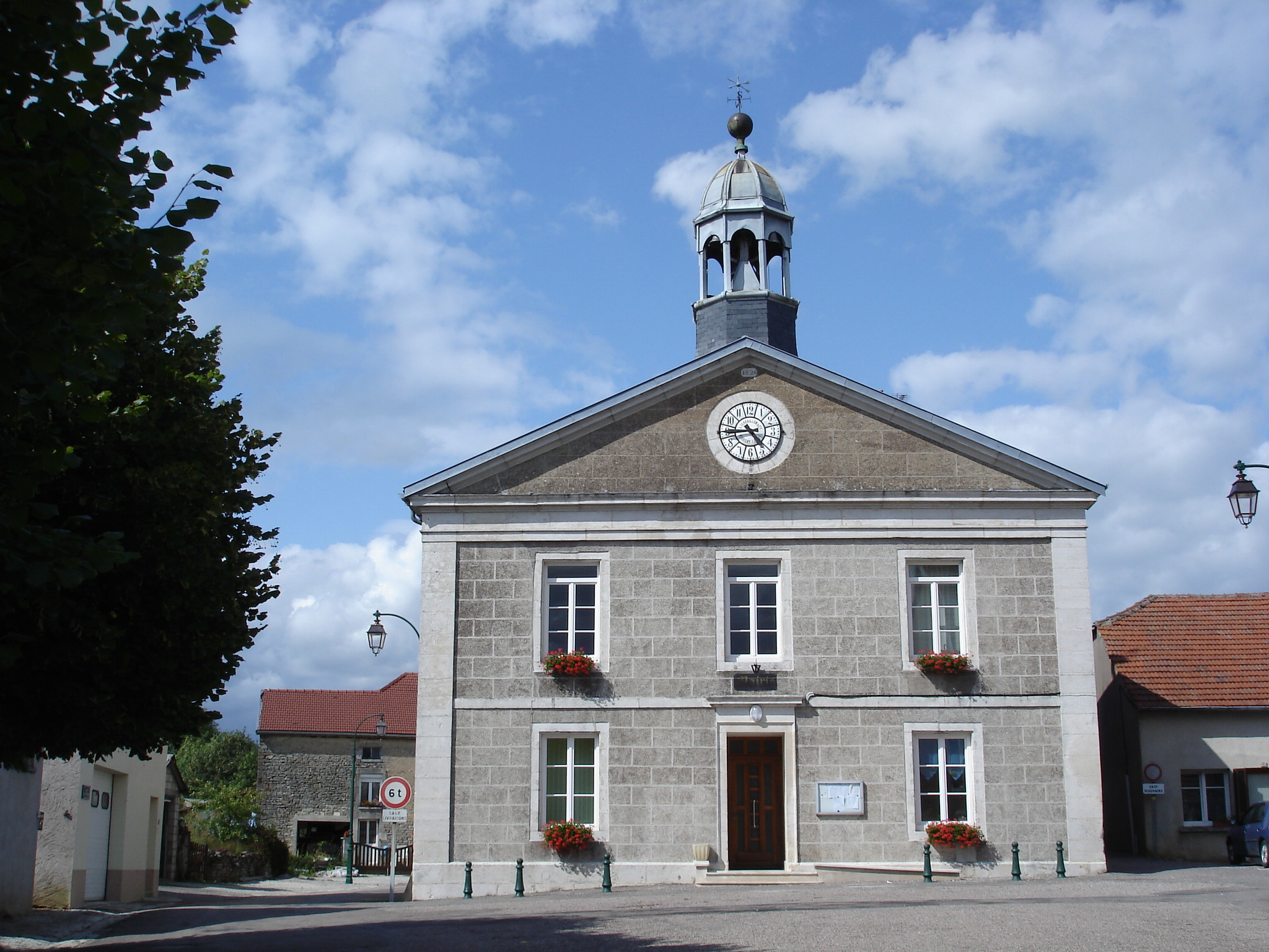 Mairie de Clefmont (Haute-Marne)